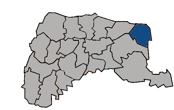 台灣省雲林縣林內鄉 KaurJmeb於2005年1月28日為編輯zh:林內鄉所繪製